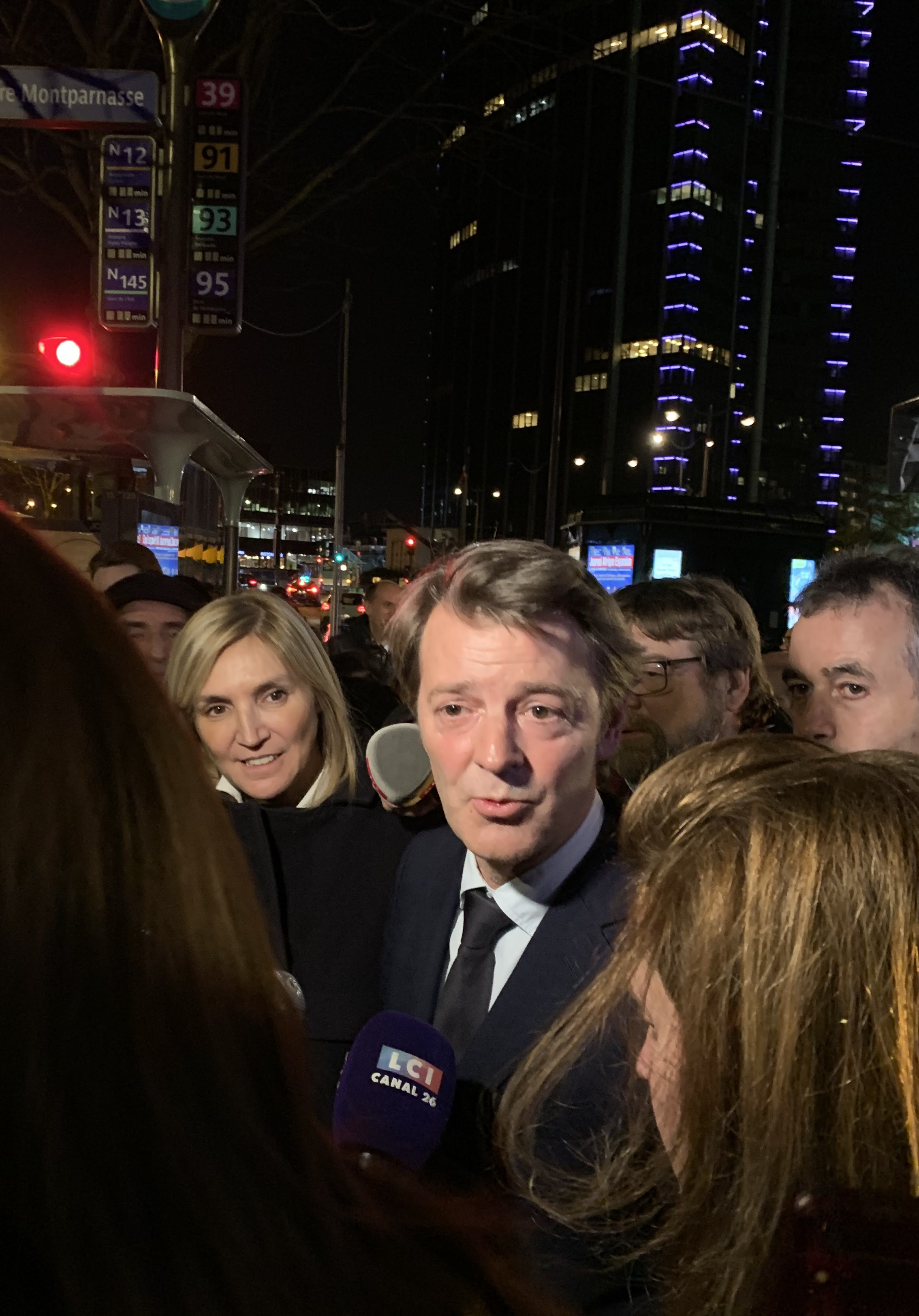 François Baroin au côté d'Agnès Evren à la suite d'une réunion de soutien à Rachida Dati, candidate LR à la mairie de Paris.